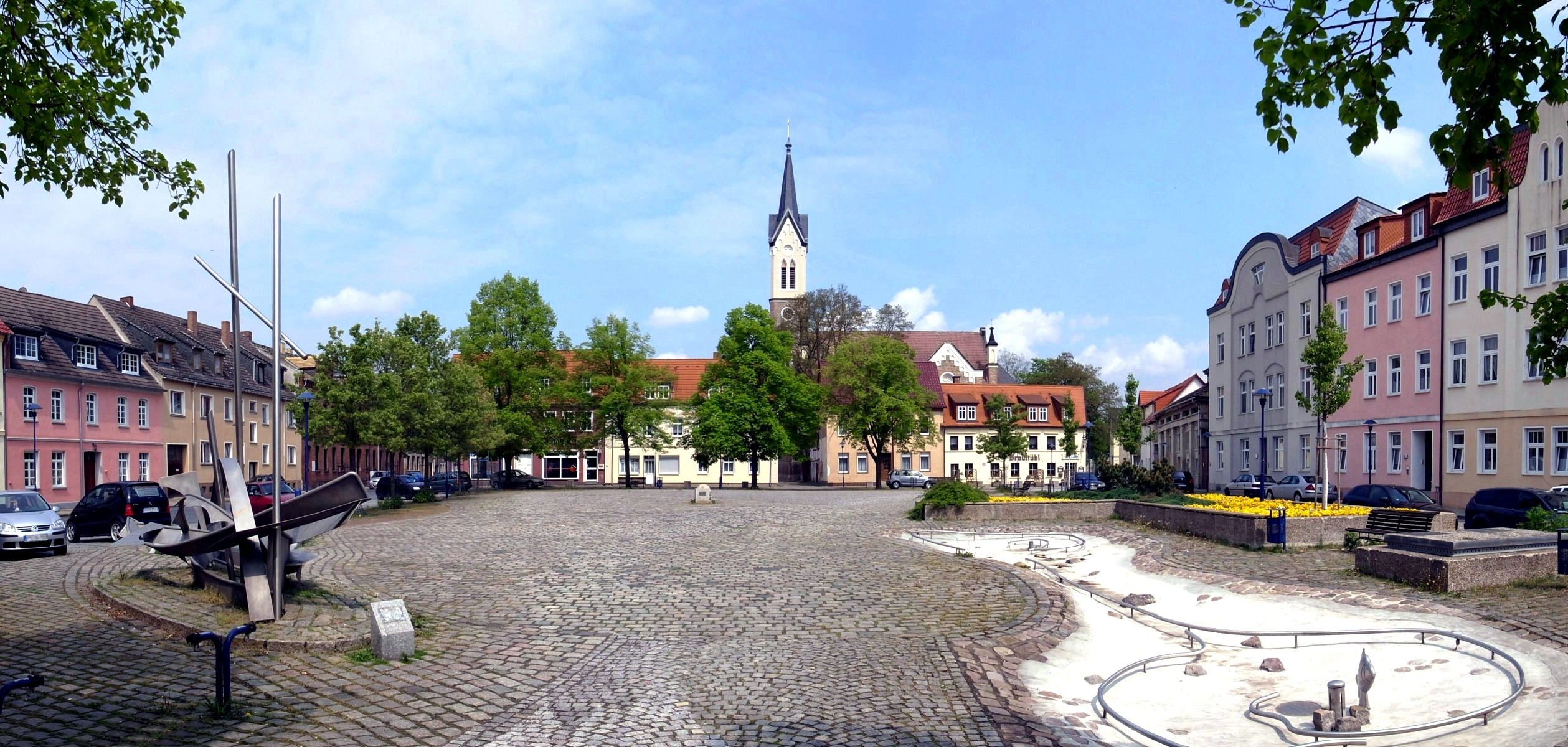 Roßlau, Markt und Ev. Stadtkirche St. Marien